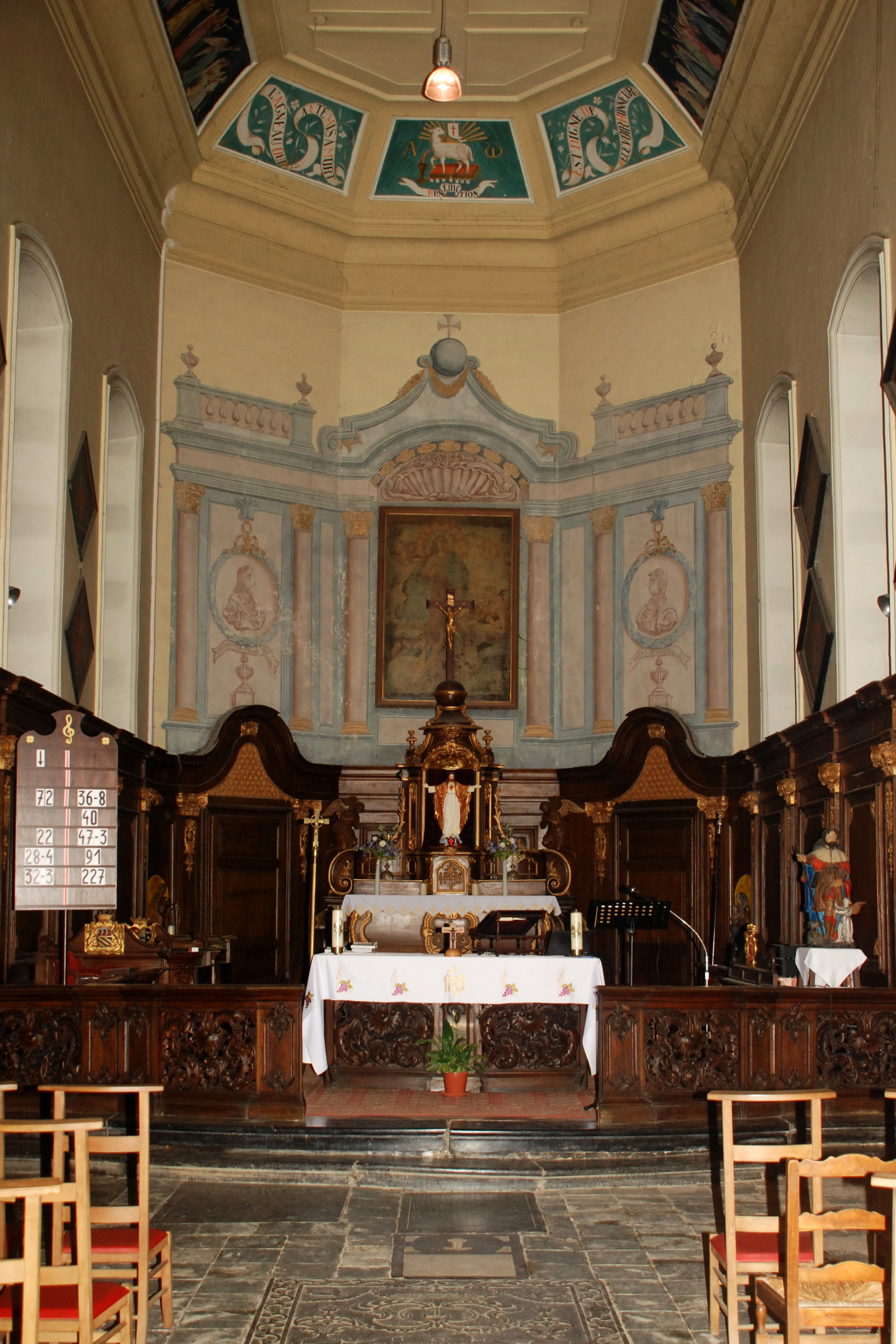 Belgique - Brabant wallon - Église Saint-Martin de Ways